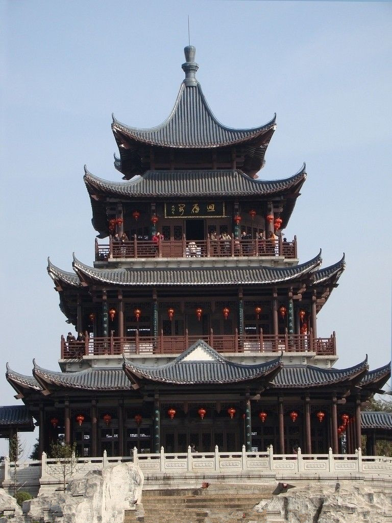 位于回雁峰上